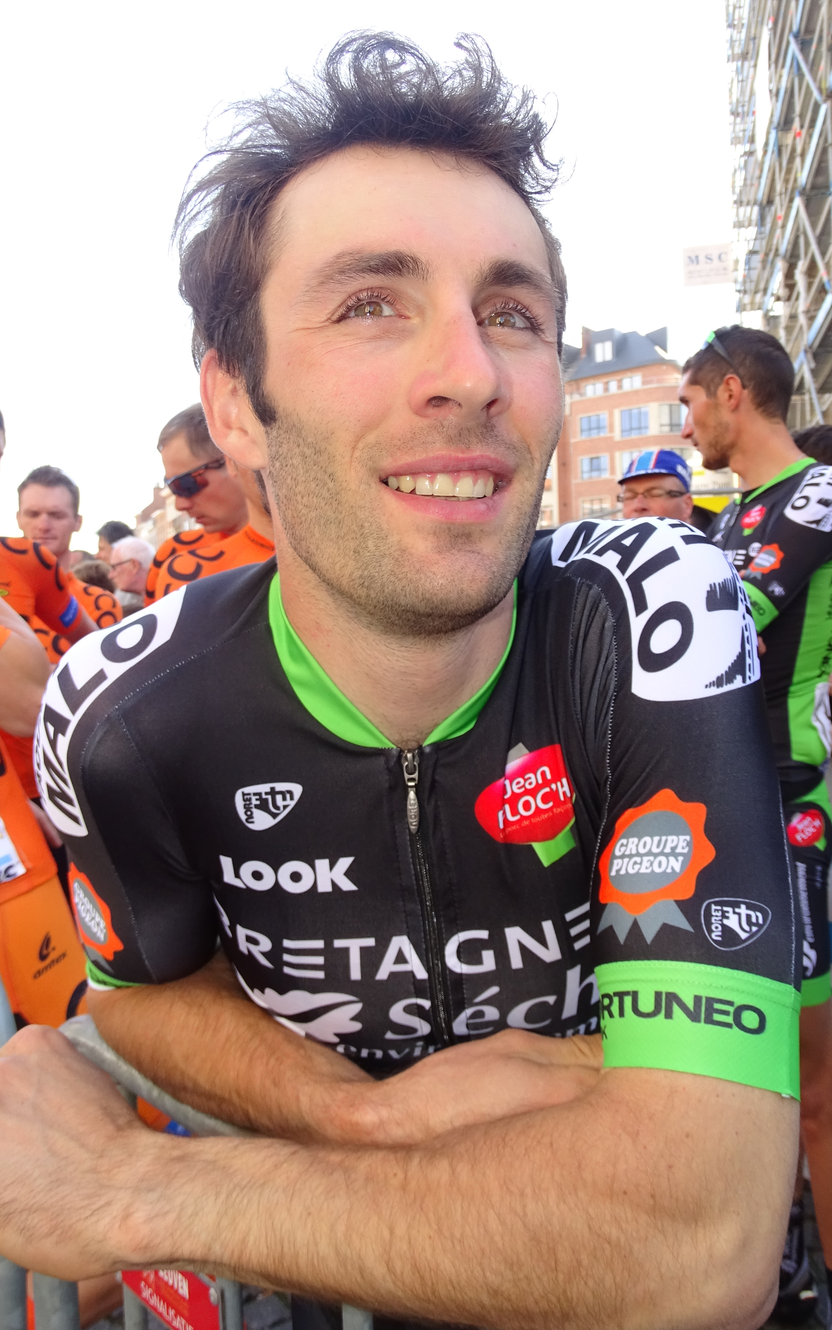 Reportage réalisé le mercredi 15 avril à l'occasion du départ de la Flèche brabançonne 2015 à Louvain, Belgique.